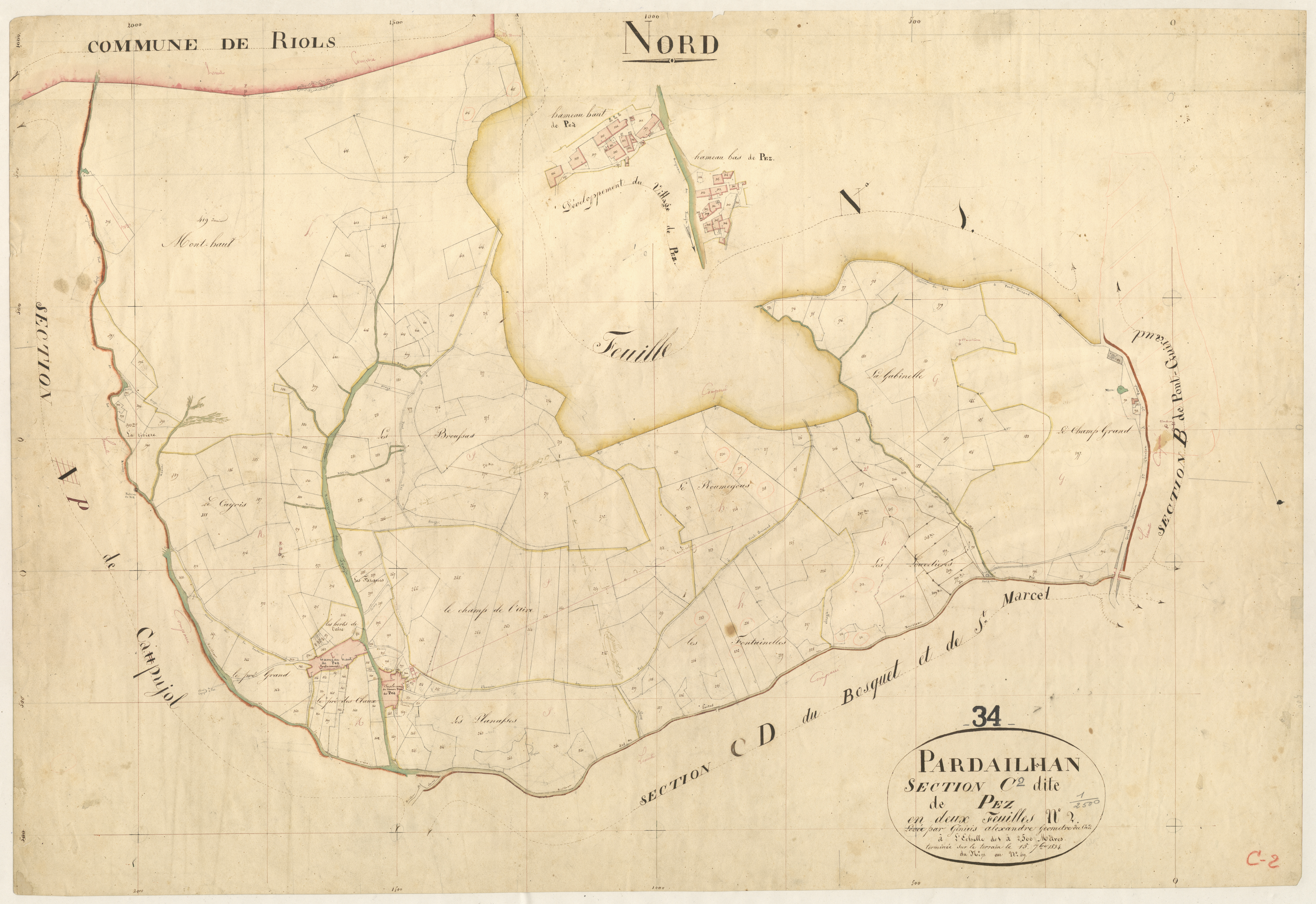 Pardailhan. - Cadastre napoléonien : section C2 de Pez.